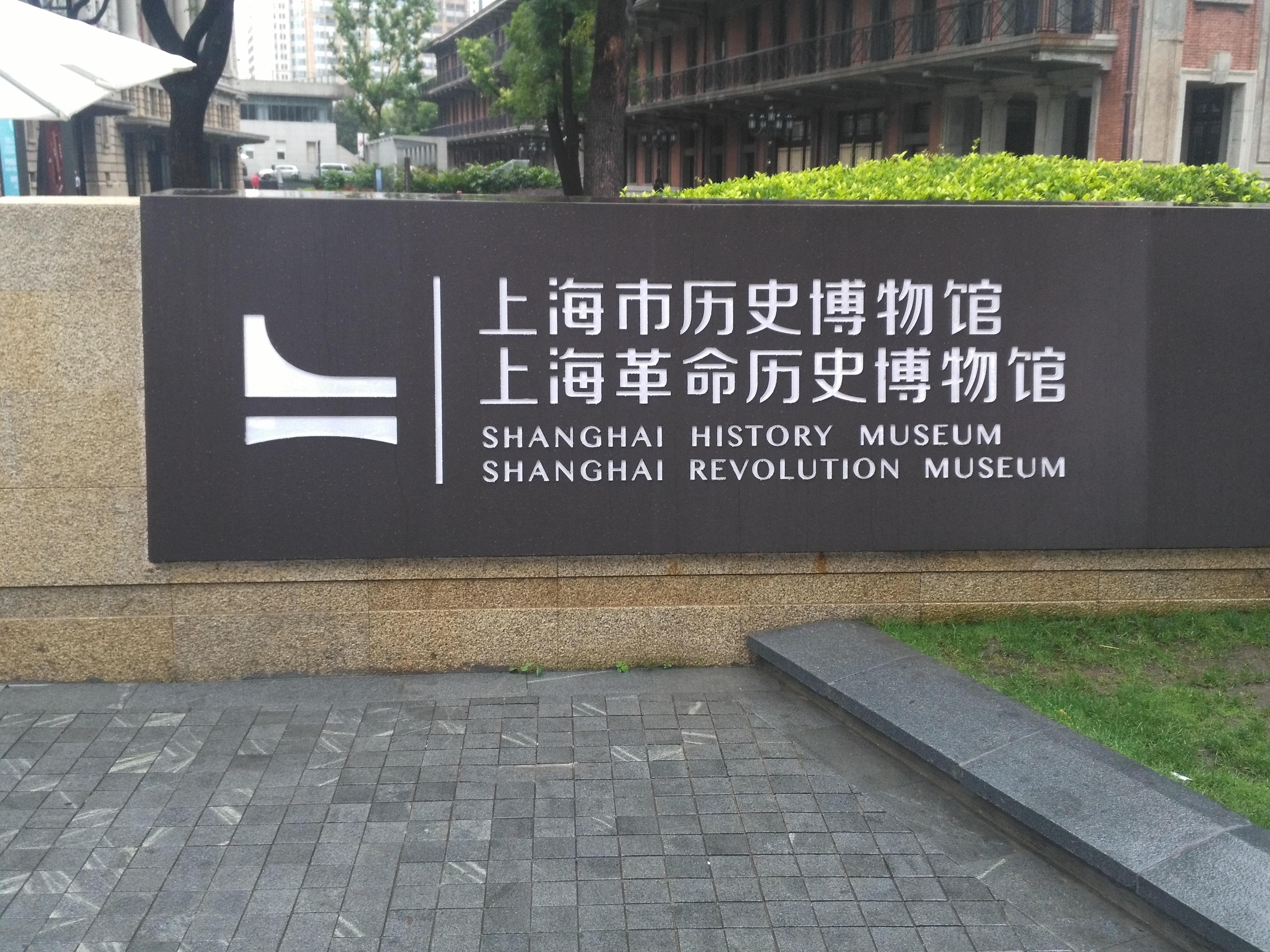 上海历史博物馆大门